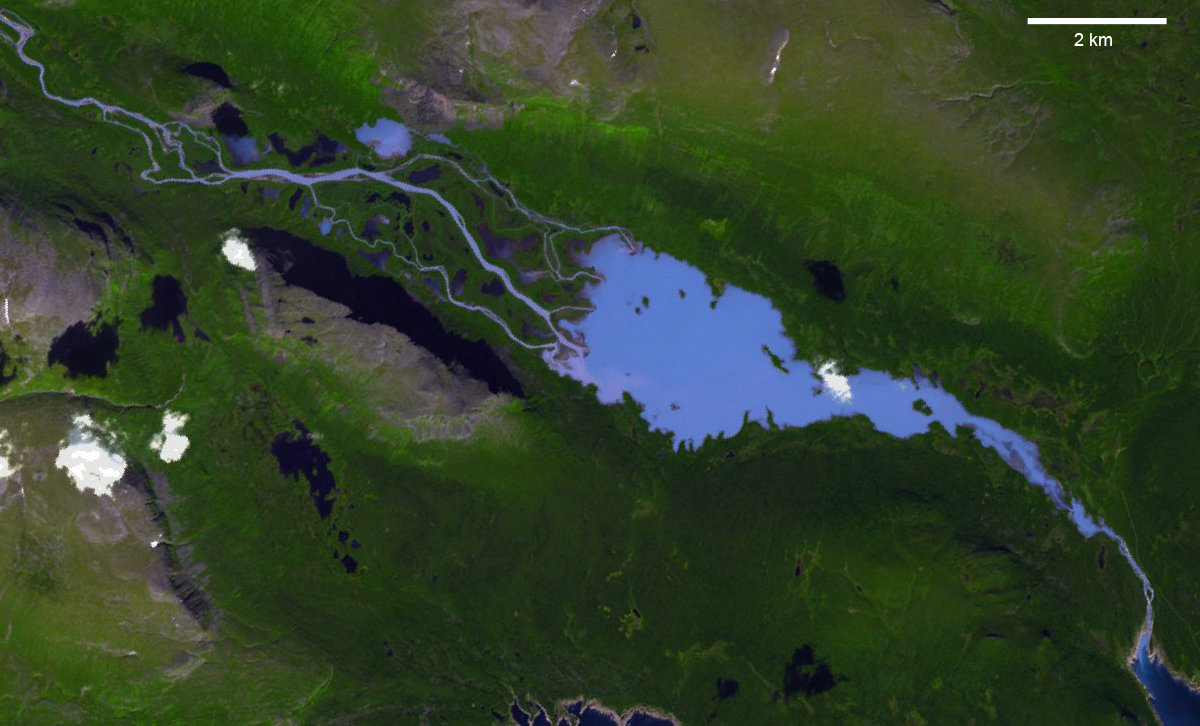 Delta de la Rapaätno qui se jette dans le Laitaure, dans le parc national de Sarek, en Botnie du Nord (Norbotten), Suède.